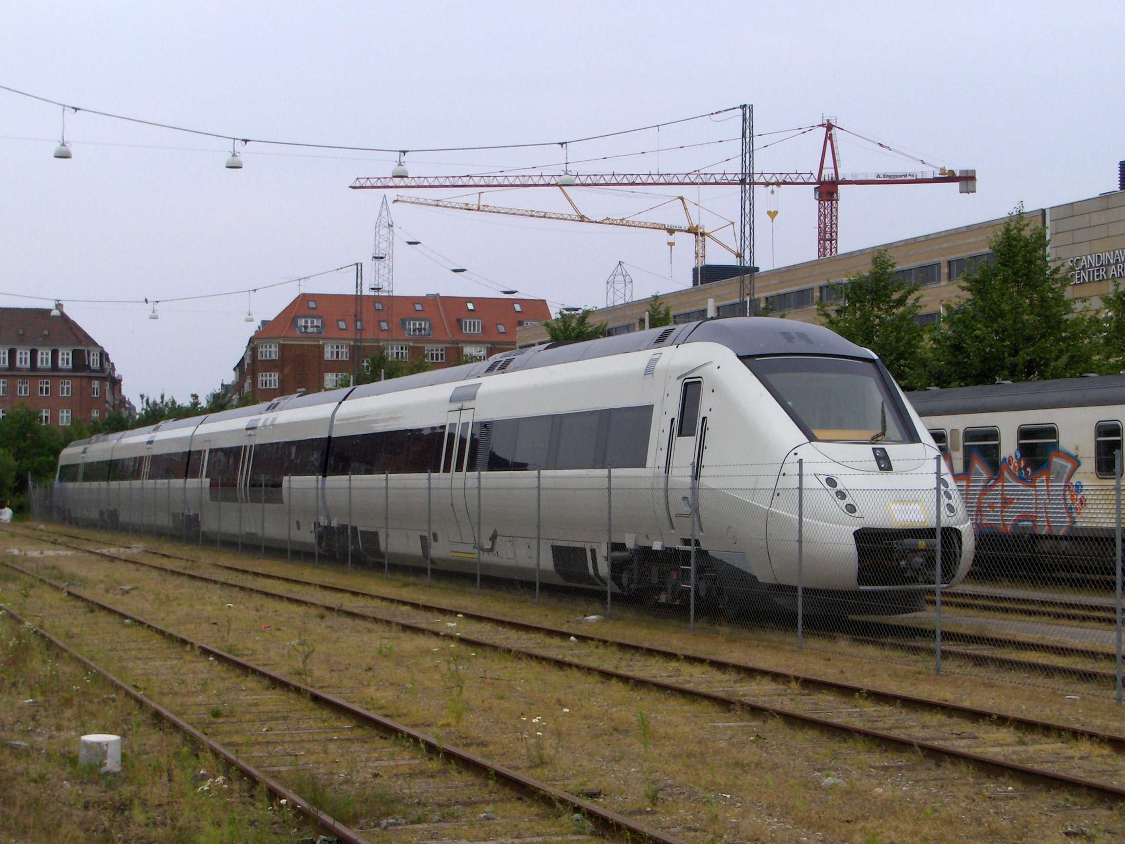 DSB IC4 test train in Århus, Denmark.